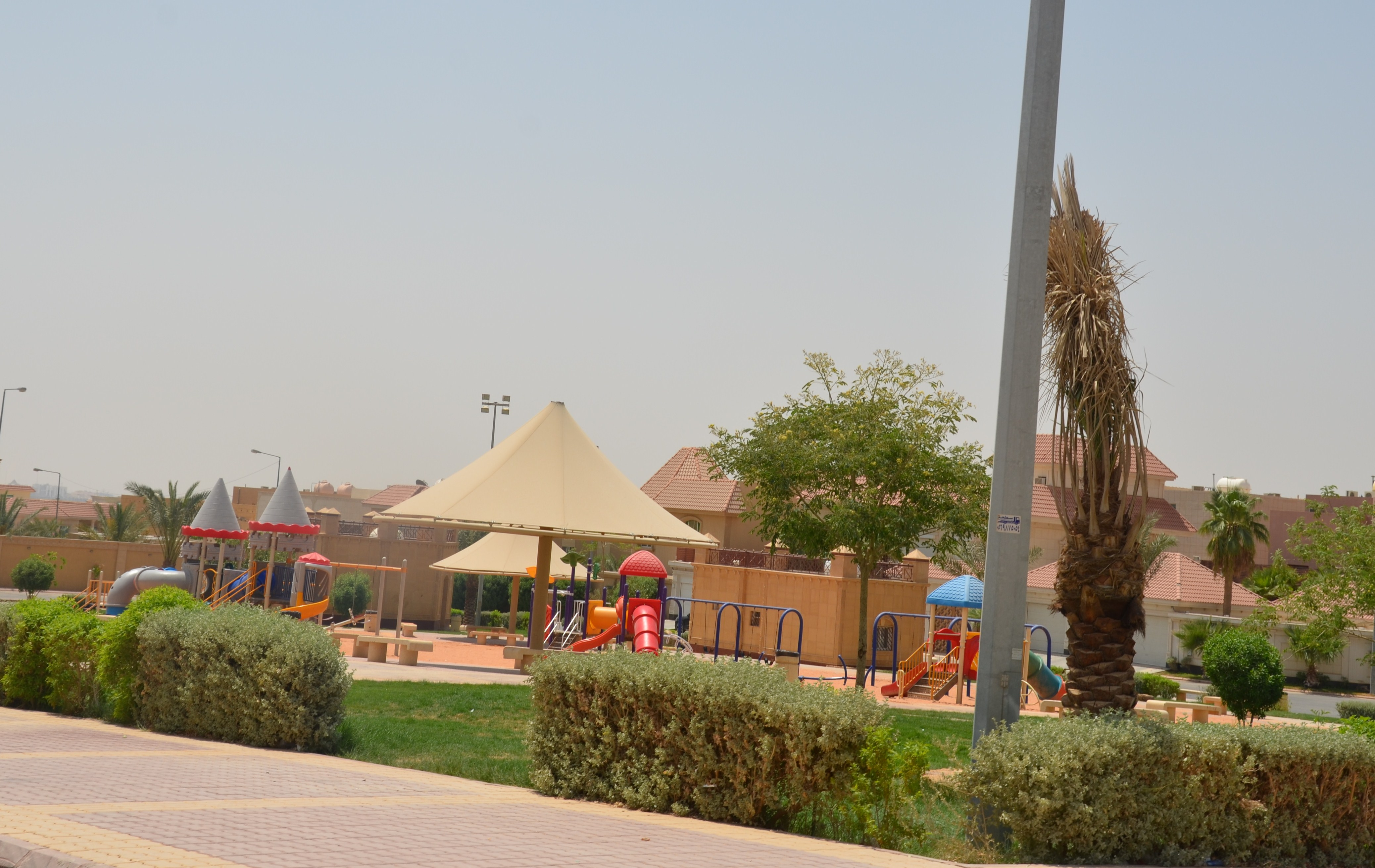 حديقة حي الواحة الرياض المملكة العربية السعودية